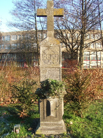 Wegkreuz der Kommende Ramersdorf – „Kommendekreuz“ – Inschrift: „EMVNT GOTTFRI/ED FREIHERR VON/BOCHOLTZ VOREY HE/RR ZV GRANVILLE, TEV/TSCHEN ORDENSRITER/COMMENTHVR ZV MAS/TRICHT LANDCOMMEN/THUR DER BALLEY ALDE/BIESEN, FREYHERR ZV GEME/T,GRAVERODE VND S.PET/ERS FOVREN DEN APRILIS“ Ort: Kreuzung (heute Kreisel) Oberkasseler Straße und Königswinterer Straße in Ramersdorf